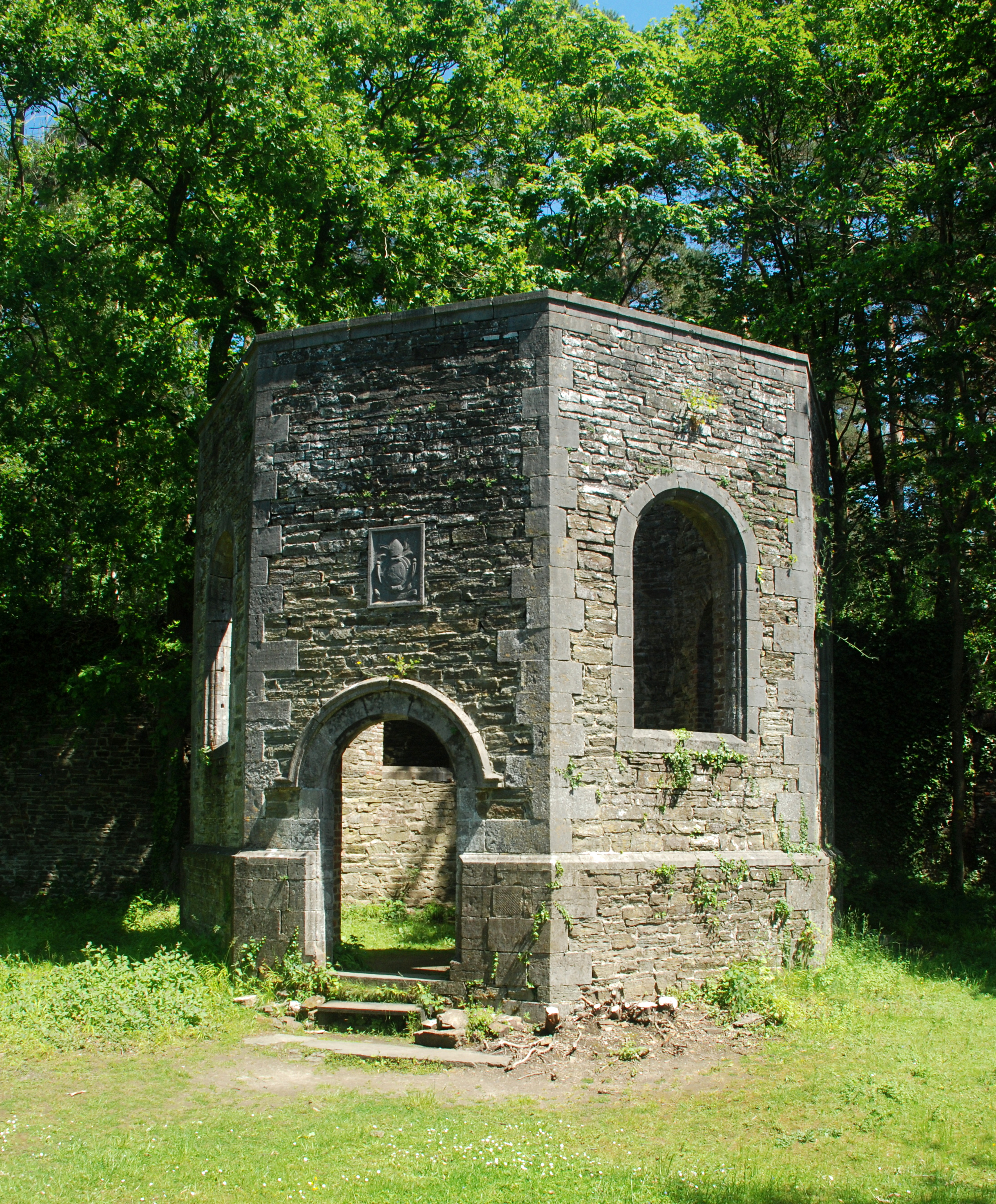 Belgique - Brabant wallon - Villers-la-Ville - Chapelle Notre-Dame de Montaigu